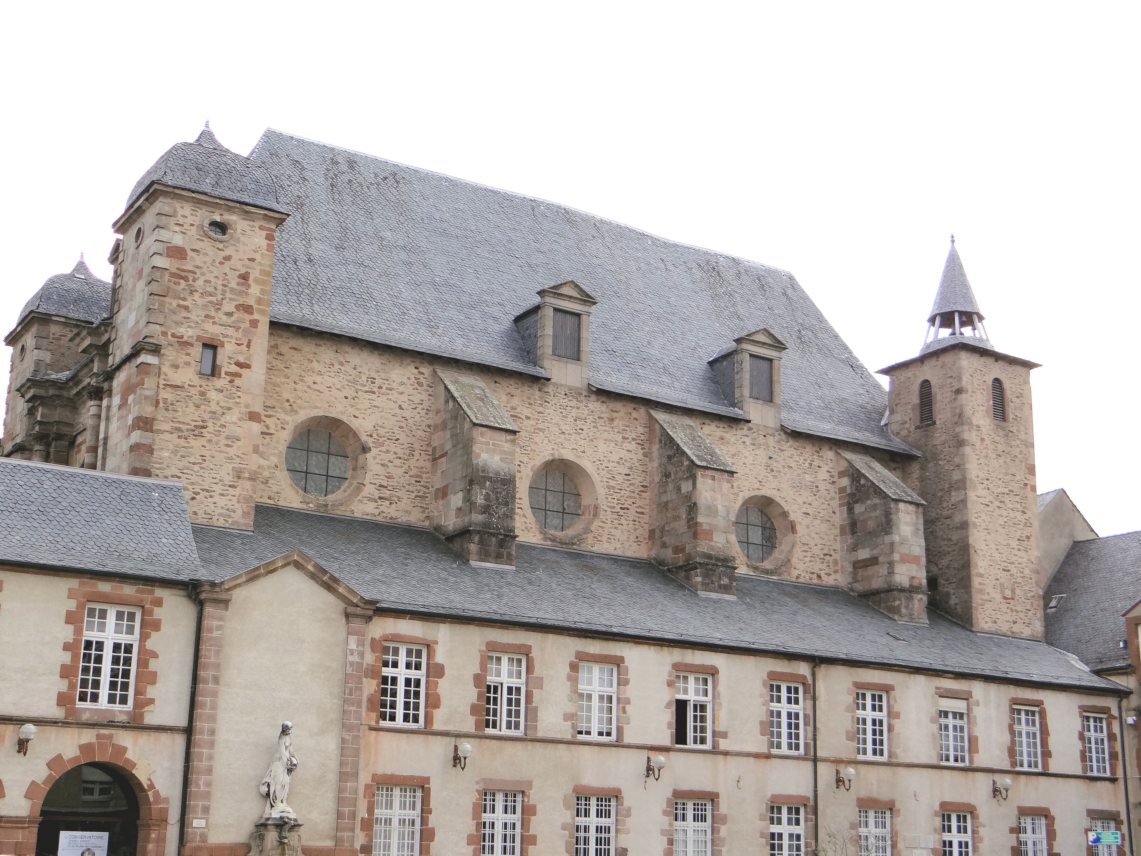 Rodez - Chapelle de l'ancien collège des jésuites, ancien lycée Foch et la naïade de Vors sur la place Foch